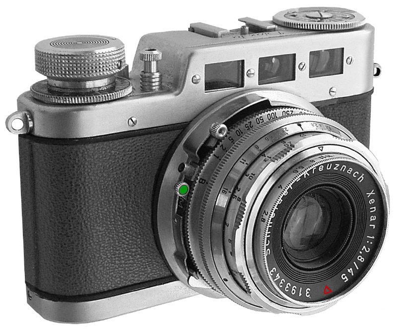 Unverwechselbar: die Diax-Modelle mit der Stufenkappe und den drei Sucherfenstern für die Wechselobjektive, die von bester Qualität (Schneider und ISCO) waren. Zusammen mit dem Synchro-Compur-Verschluss schon ein Fotoapparat für gehobene Ansprüche. Das Glas der drei Sucher war übrigens verschieden gefärbt: 45-50 mm klar, 35 mm blau und 90 mm gelb. Auch das bemerkenswerte Gewicht von 630 g trug zum Qualitätseindruck bei. Der Filmtransport erfolgte über einen Drehknopf, immerhin wurde dabei auch der Verschluss gespannt. Hergestellt wurde diese Kamera vom Diax-Kamera-Werk Walter Voss in Ulm, das leider nur von 1947 bis 1957 produzierte und damit das Schicksal vieler kleinerer deutscher Kamerawerke erlitt. Die abgebildete Diax Ia kam übrigens 1952 auf den Markt.